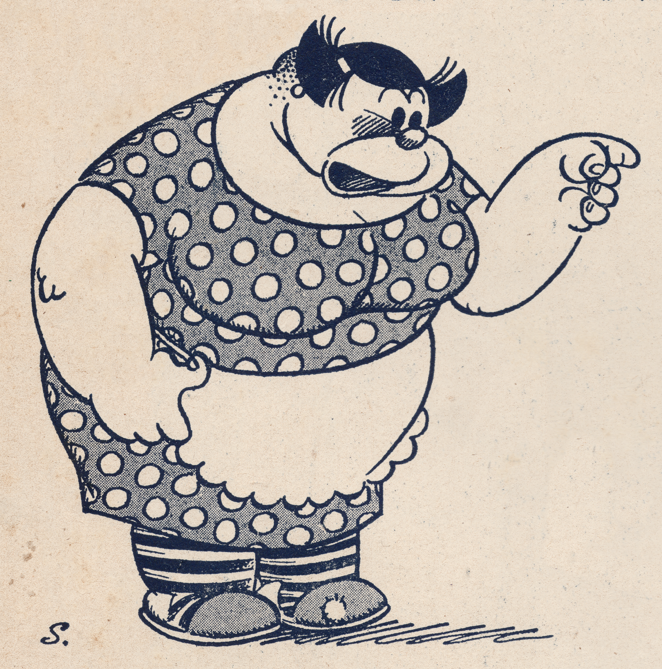 La Porota. Personaje de la historieta Peloduro, de Julio E. Suárez. Dibujo extraído de la contratapa de la revista Peloduro del 18 de diciembre de 1946.